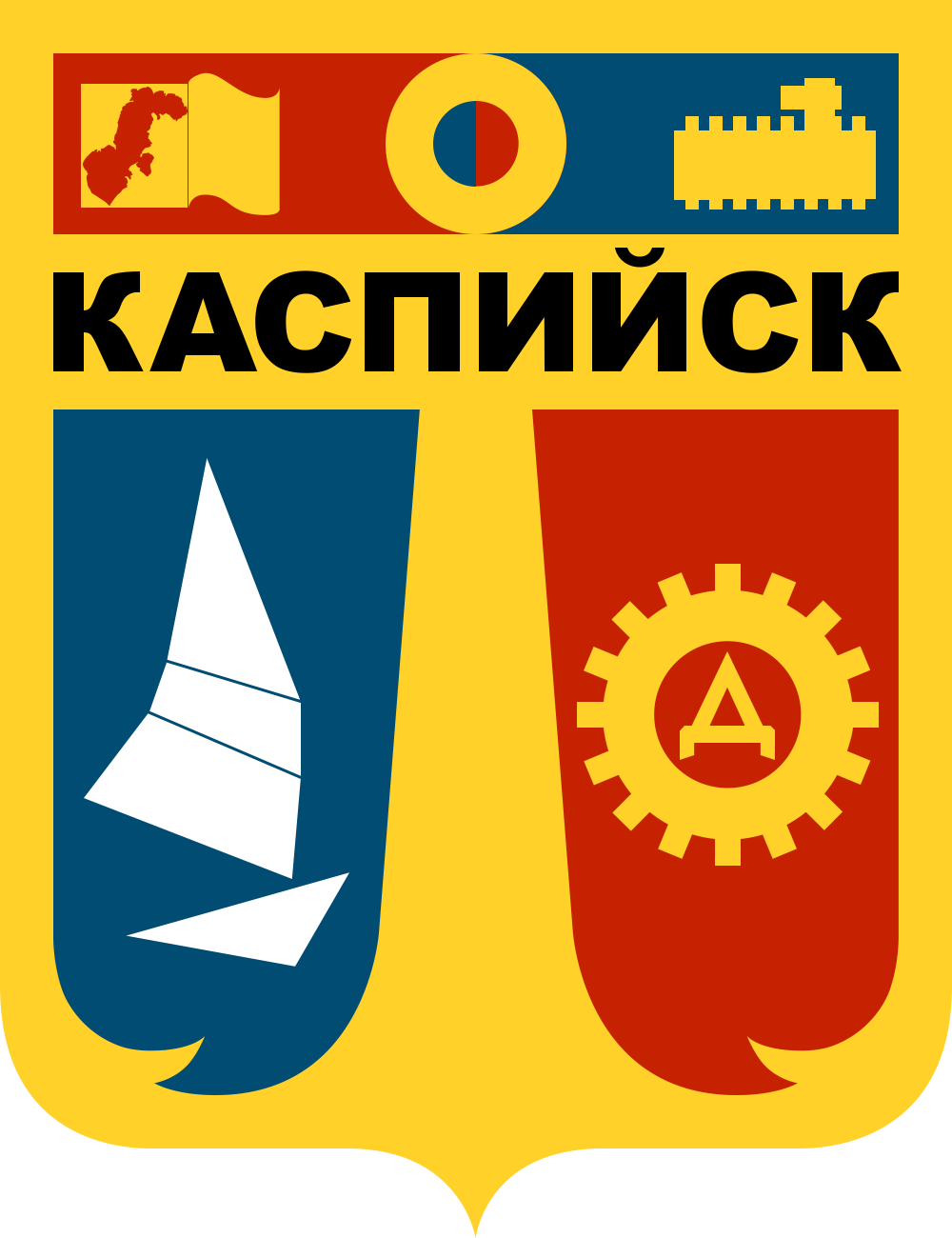 Герб города Каспийск